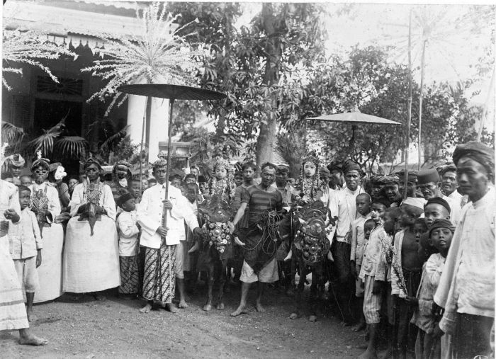 Foto. Java, optocht bij een besnijdenisfeest, links vooraan stokpaarden